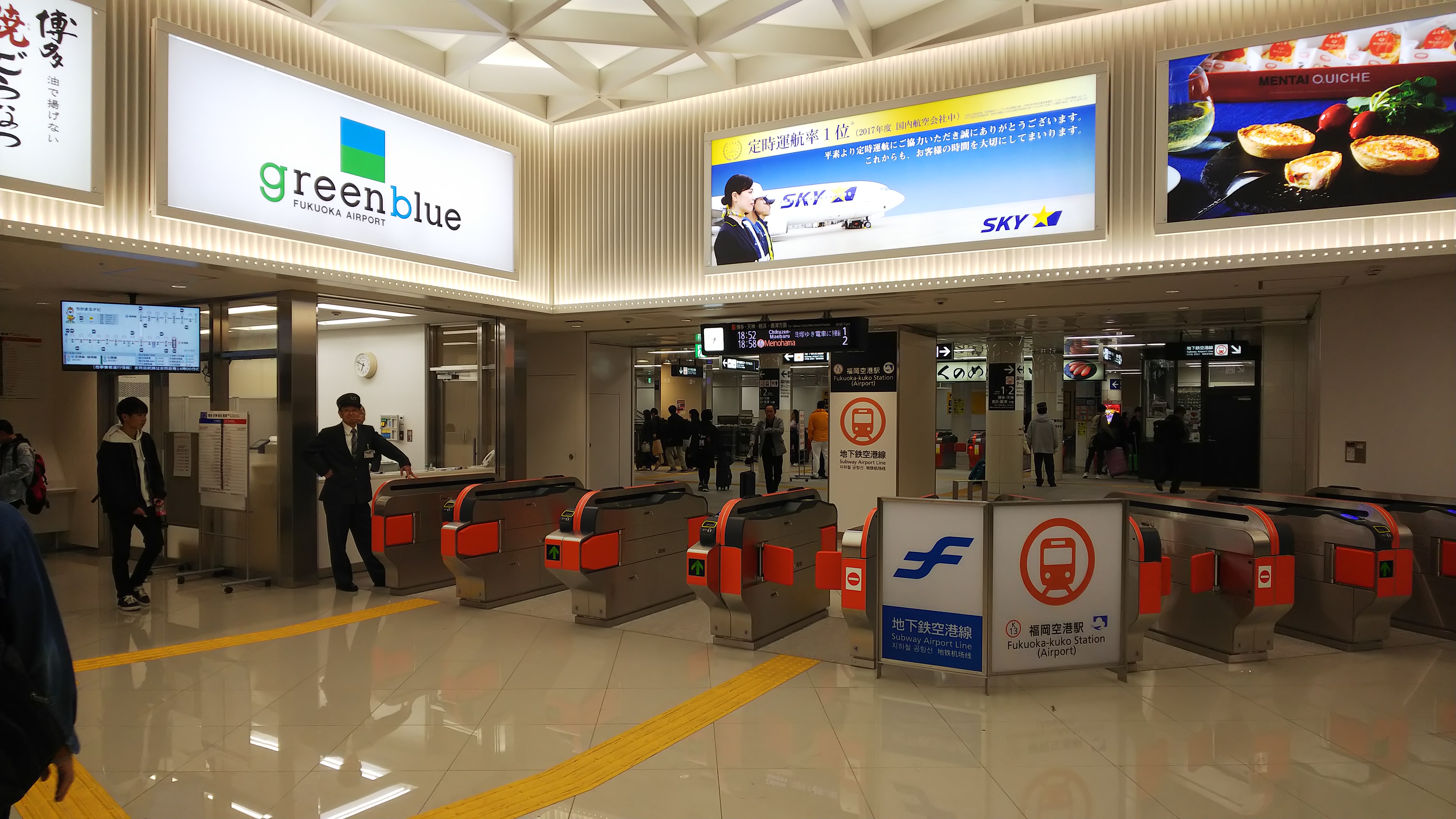 福岡市営地下鉄「福岡空港駅」アクセスホール改札口